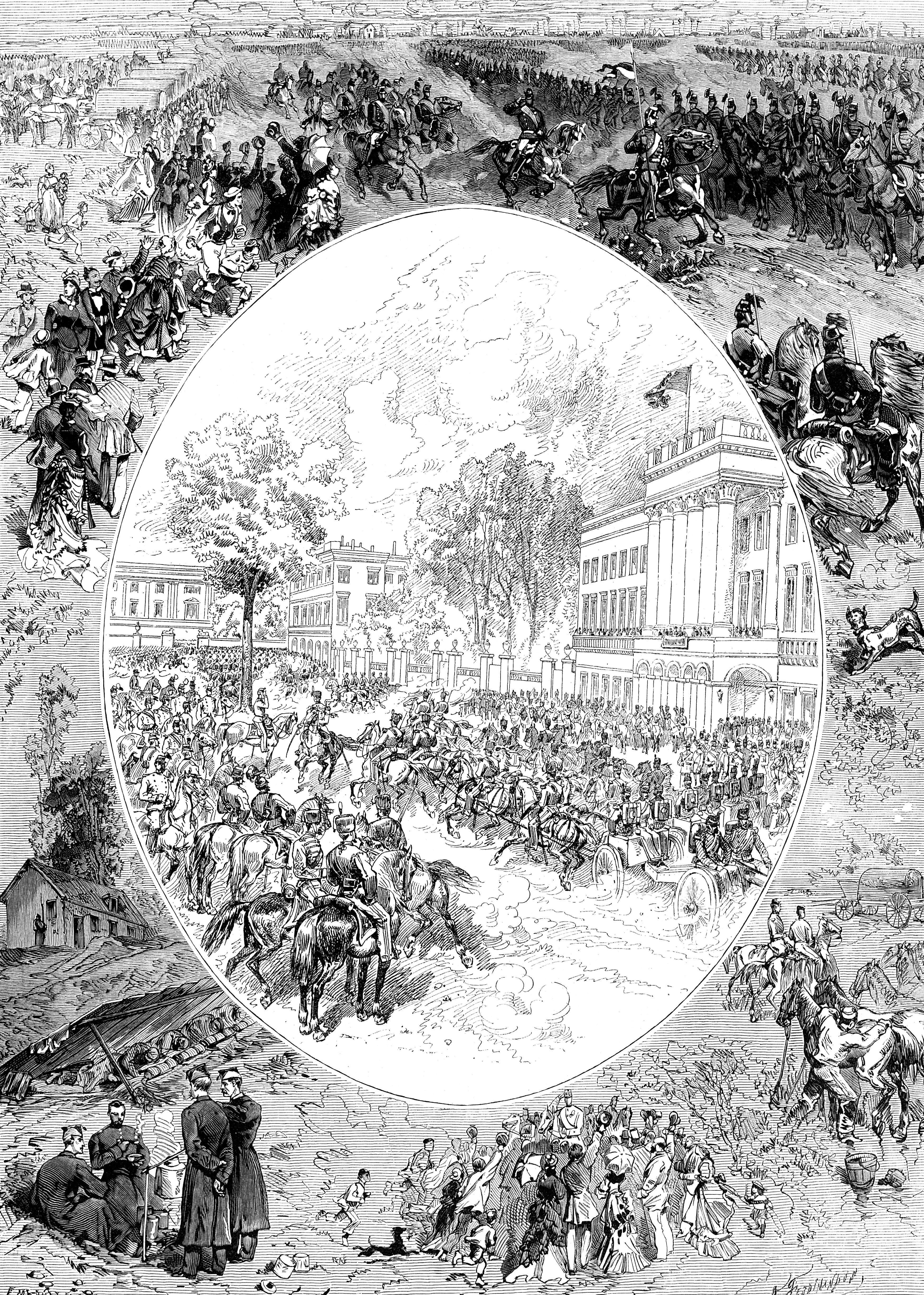 Défilé de l’armée belge devant le Palais royal de Bruxelles et grande revue de Beverloo.